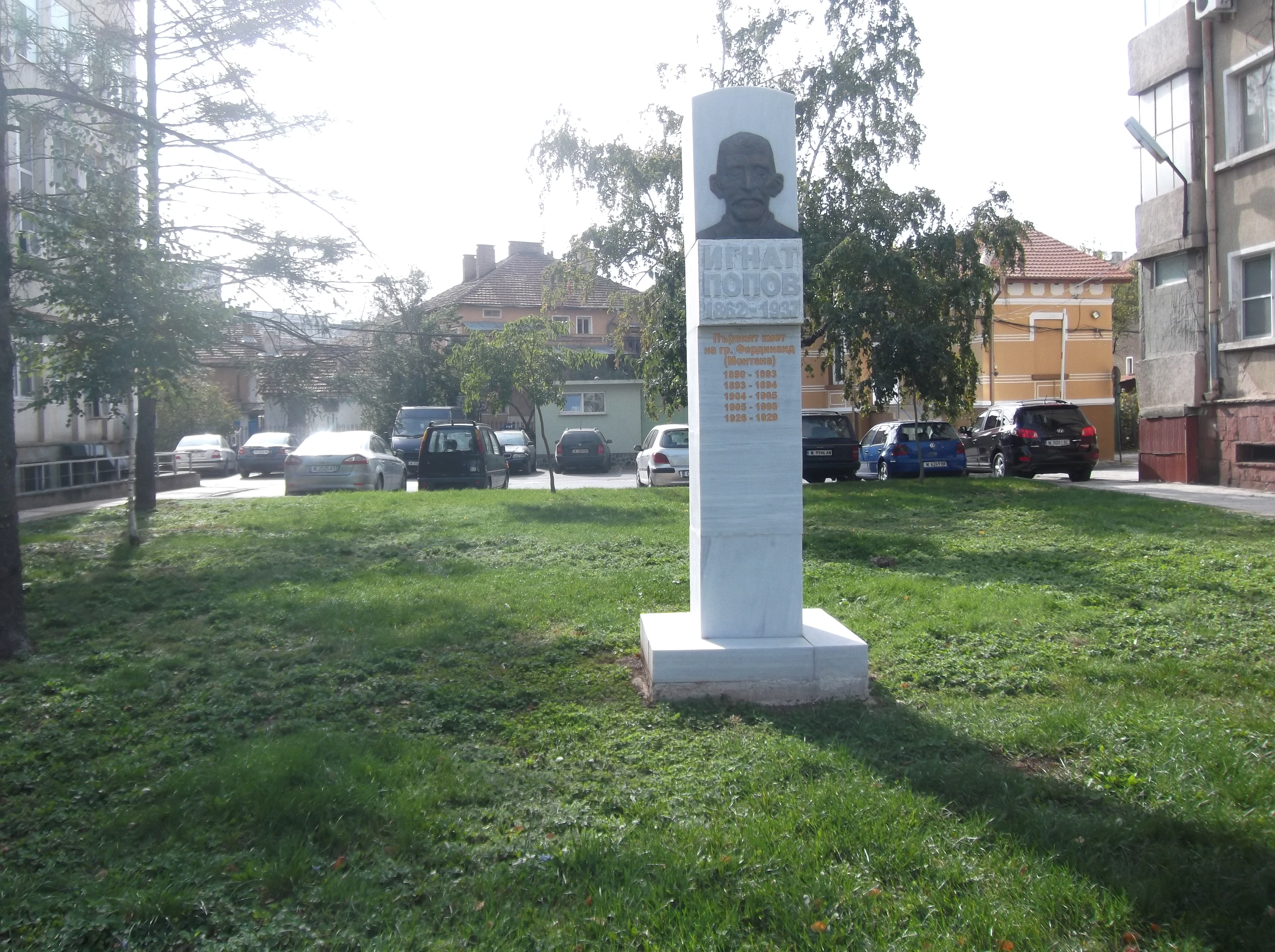 Паметник в гр. Монтана на Игнат Попов - първият кмет на гр. Фердинанд (Монтана)